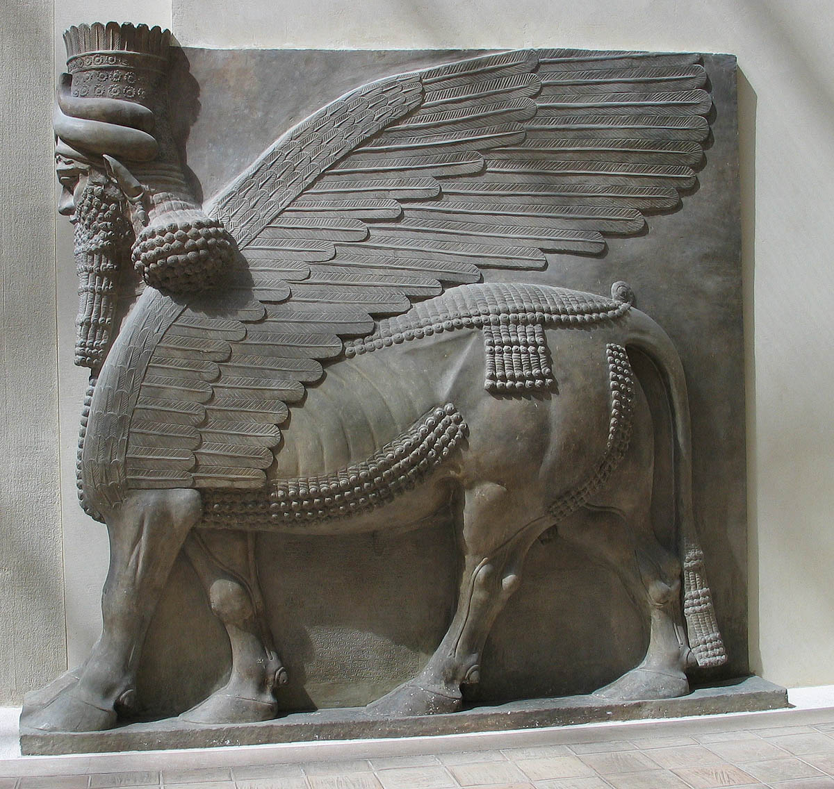 Assyrian Lamassu Statue aus Khorsabad (Musée du Louvre) Photograph: Luidger